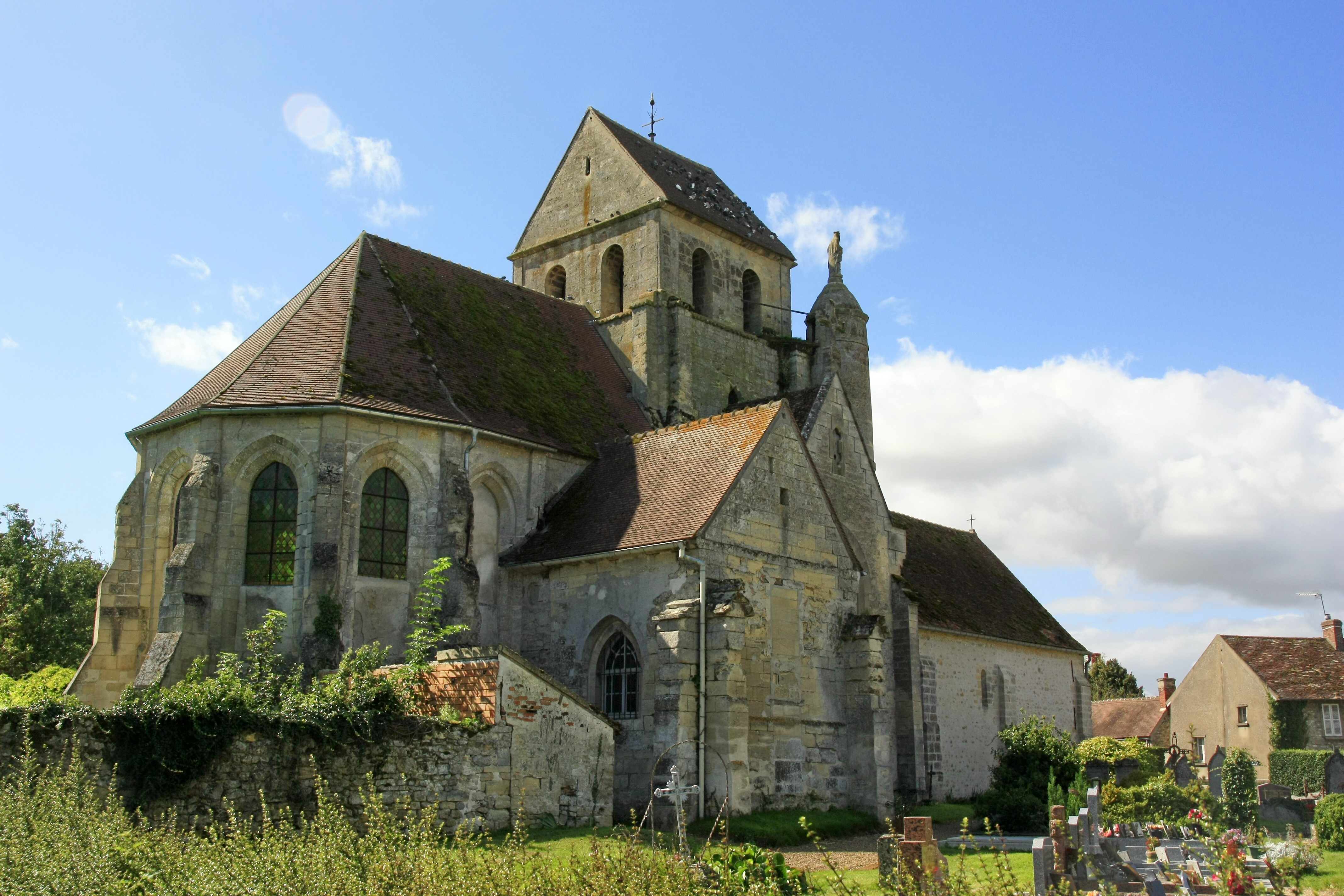 Eglise de Gouzangez, Val d'Oise (95), France vue depuis le cimetière .